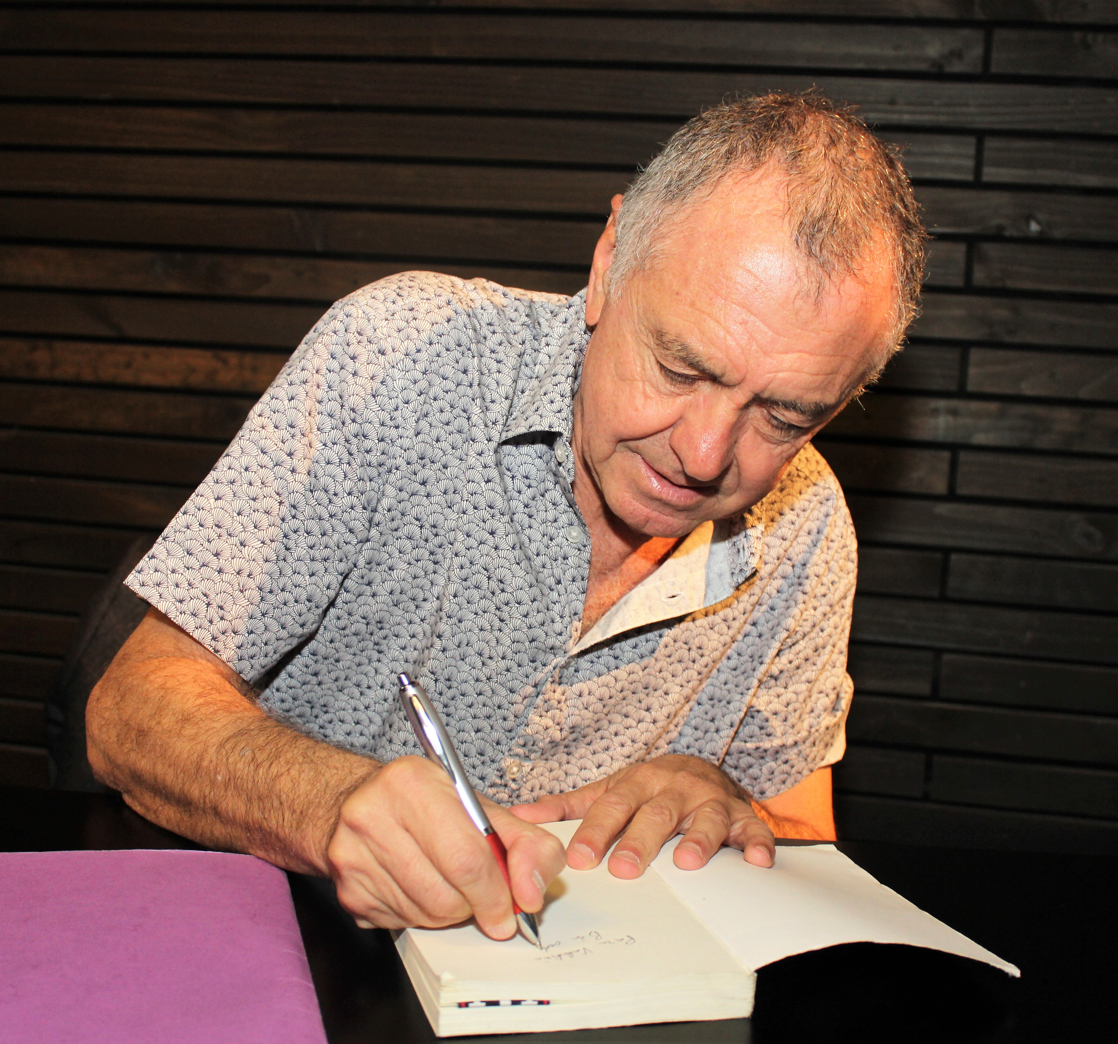 El filósofo francés Gilles Lipovetsky firma un libro después de su conferencia «El individualismo en la época hipermoderna», dada en el auditorio de la Biblioteca Nicanor Parra (Universidad Diego Portales) el 9.11.2018.